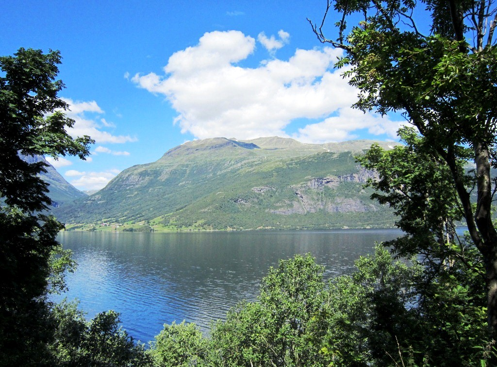 Vangsmjøse ved Vang kirke